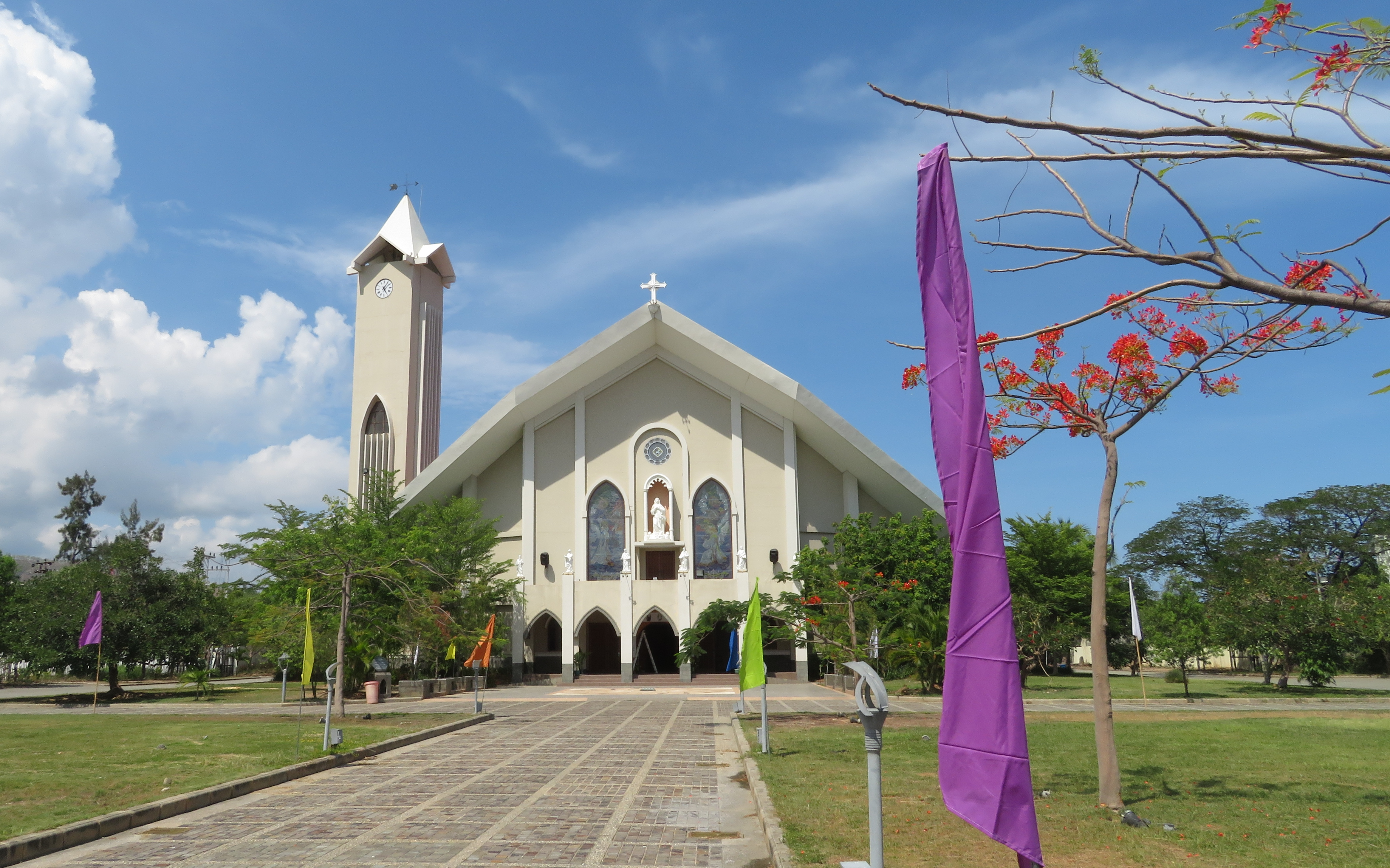 Sé (Catedral), Dili, Timor Leste